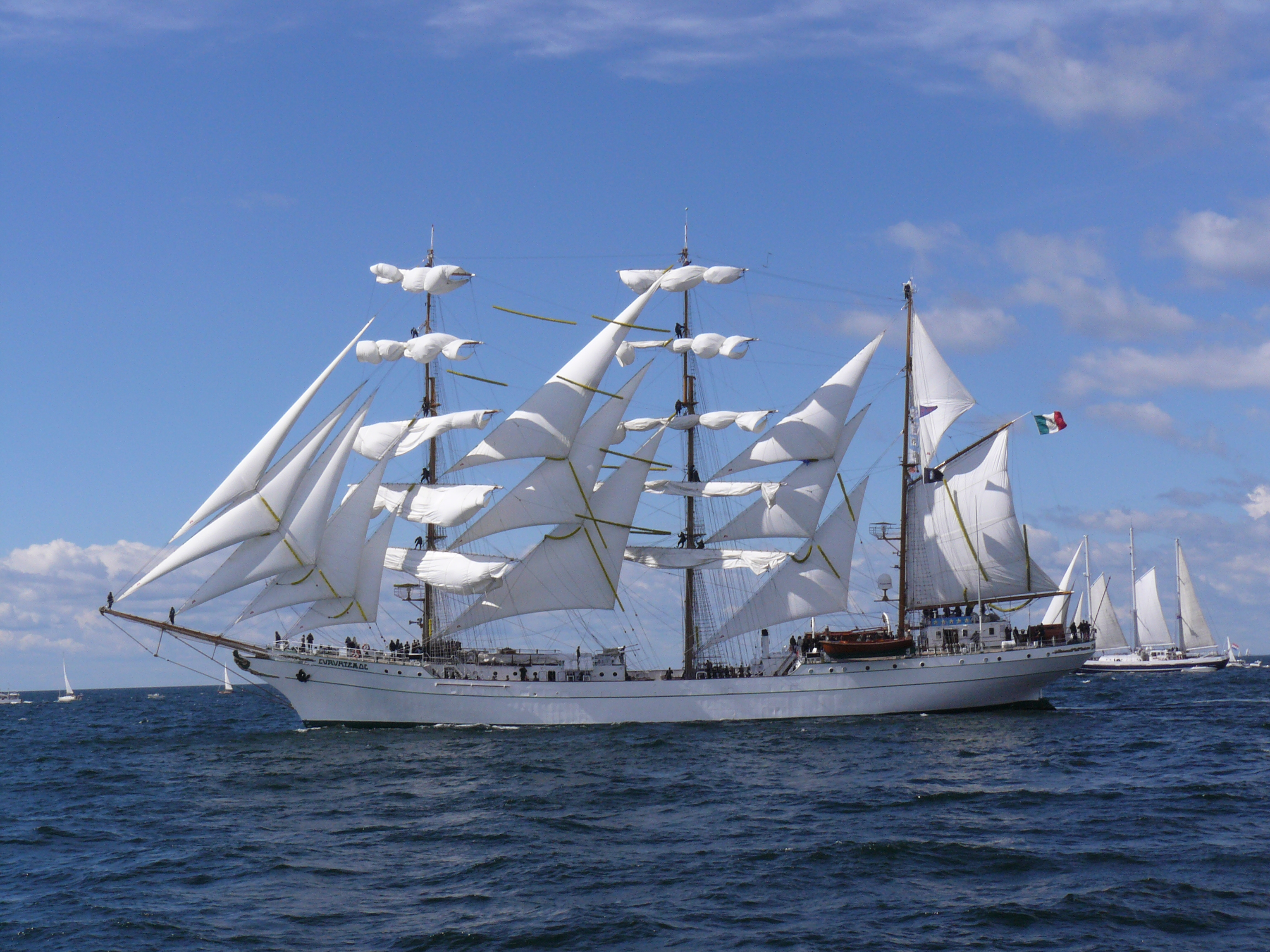 Cuauhtémoc